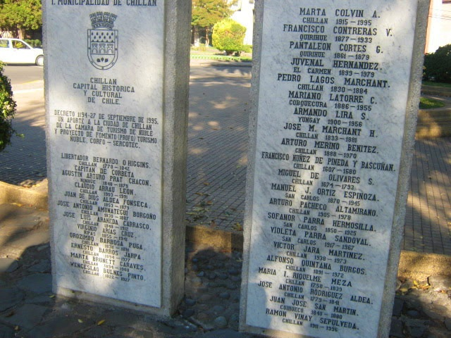 Monolito de los Hijos Ilustres de la ciudad de Chillán, Chile